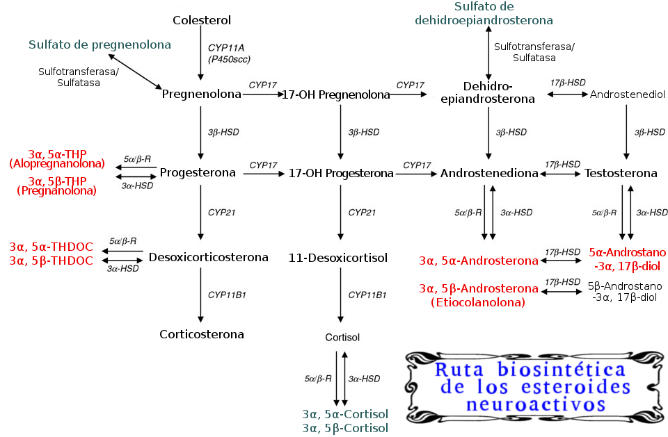 Ruta de la biosíntesis de esteroides neuroactivos.